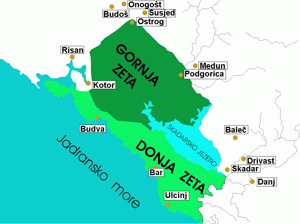 Gornja i Donja Zeta, krajem XIV vijeka.